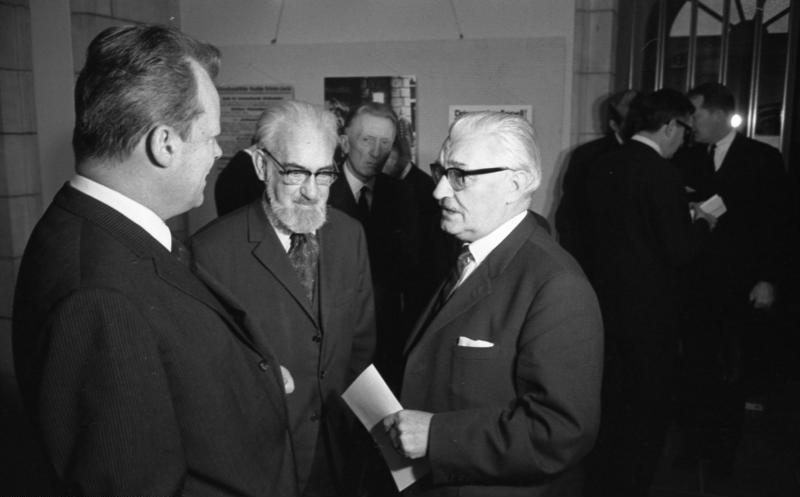 Exilanten-Tagung in Luxemburg Eröffnung der Ausstellung "Exil-Literatur" 17.-18.1.1968